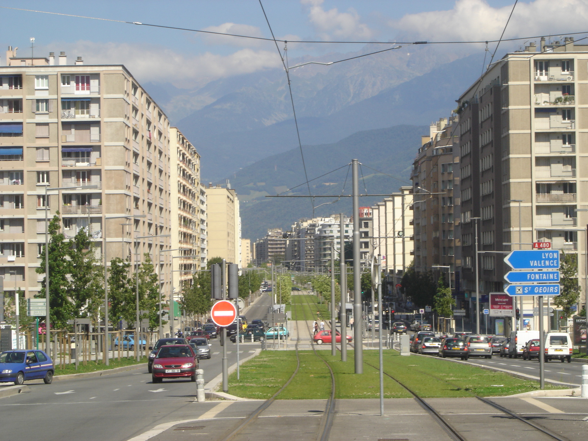 Boulevard Joseph vallier à Grenoble